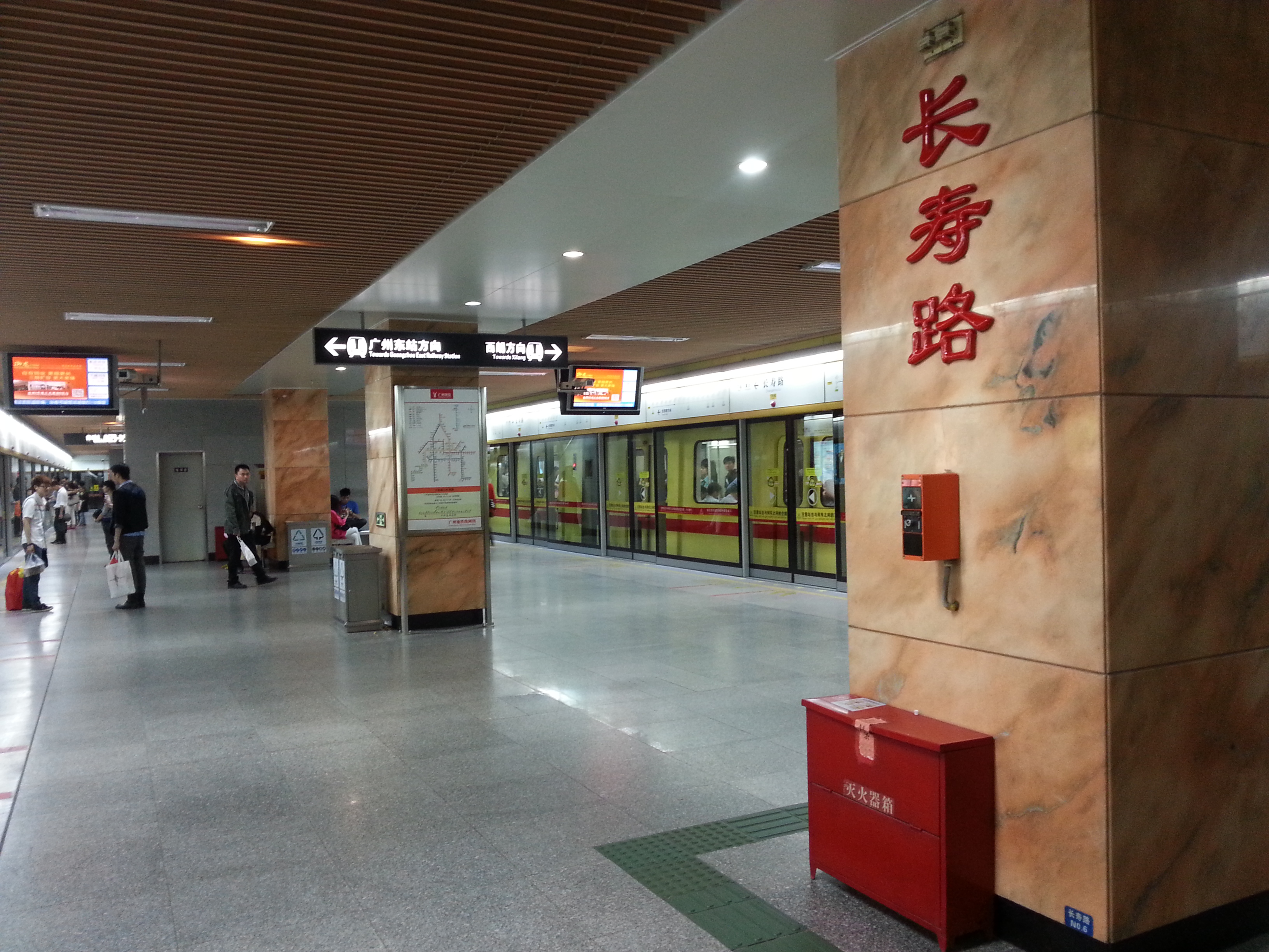 廣州地鐵長壽路站站台